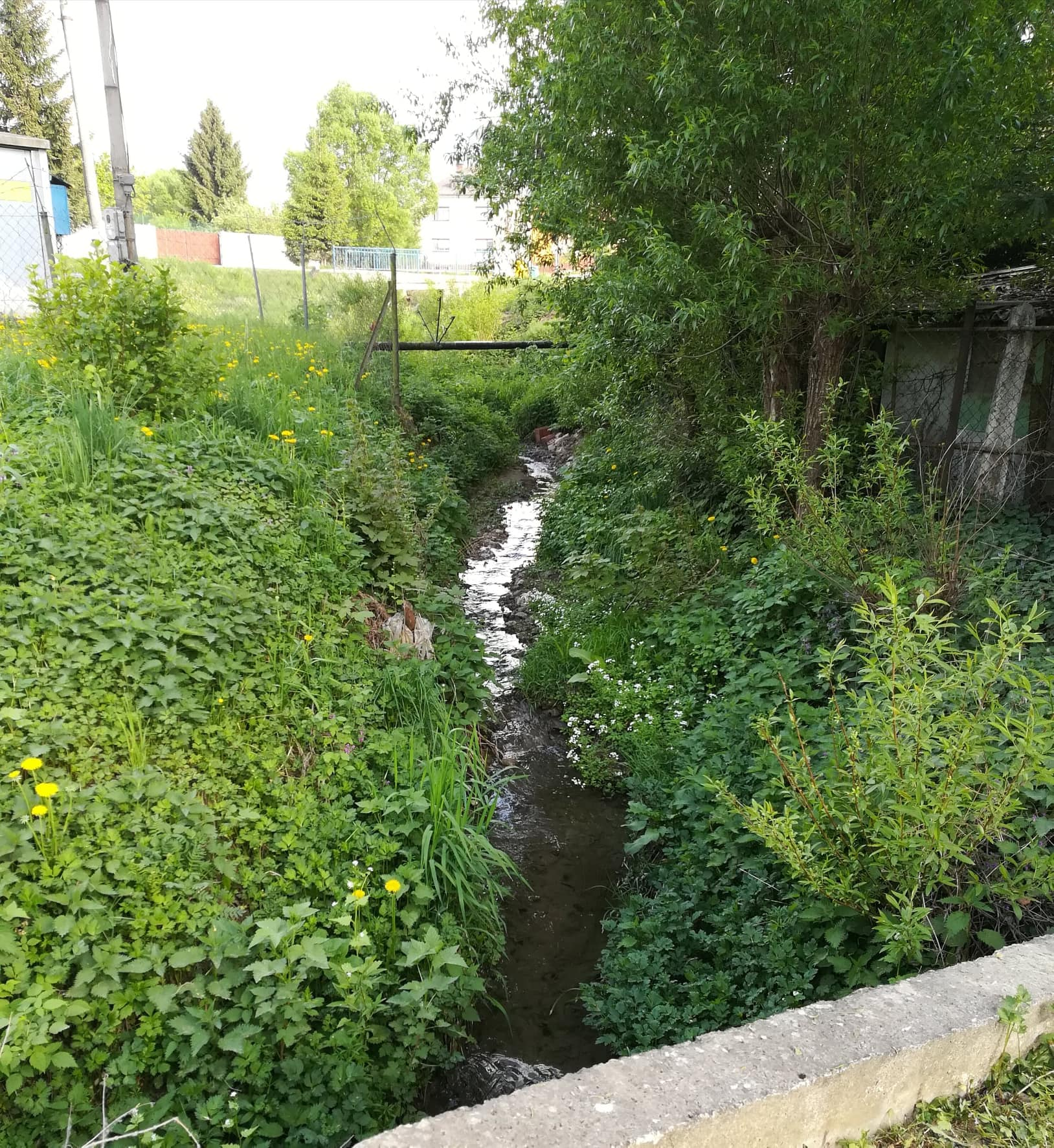 Jarok pred ústím do Rosinky